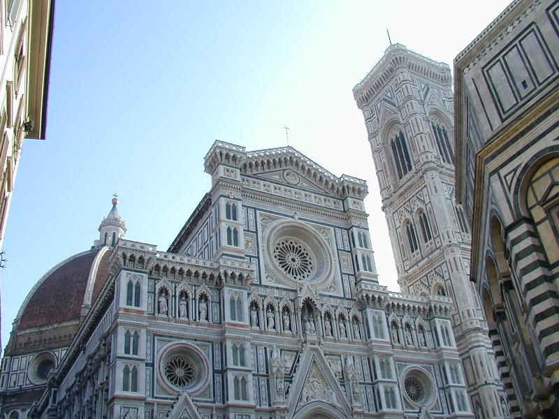 Firenze, santa maria del Fiore.